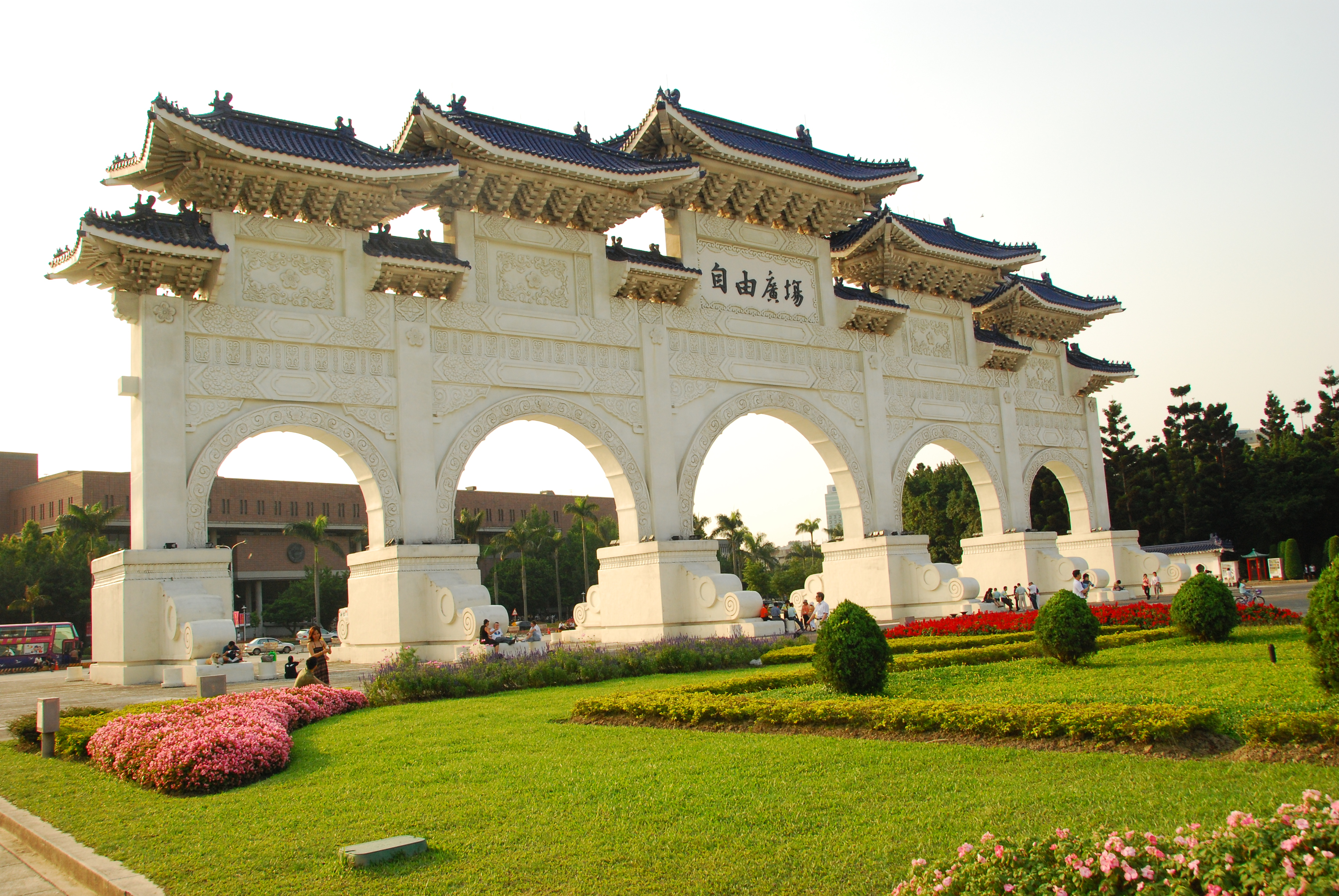 中文（台灣）: 國立中正紀念堂自由廣場牌樓背面。